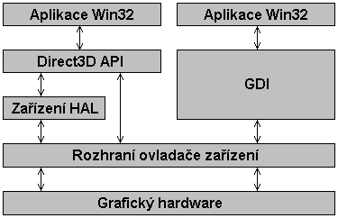 Schéma začlenení Direct3D do operačního systému